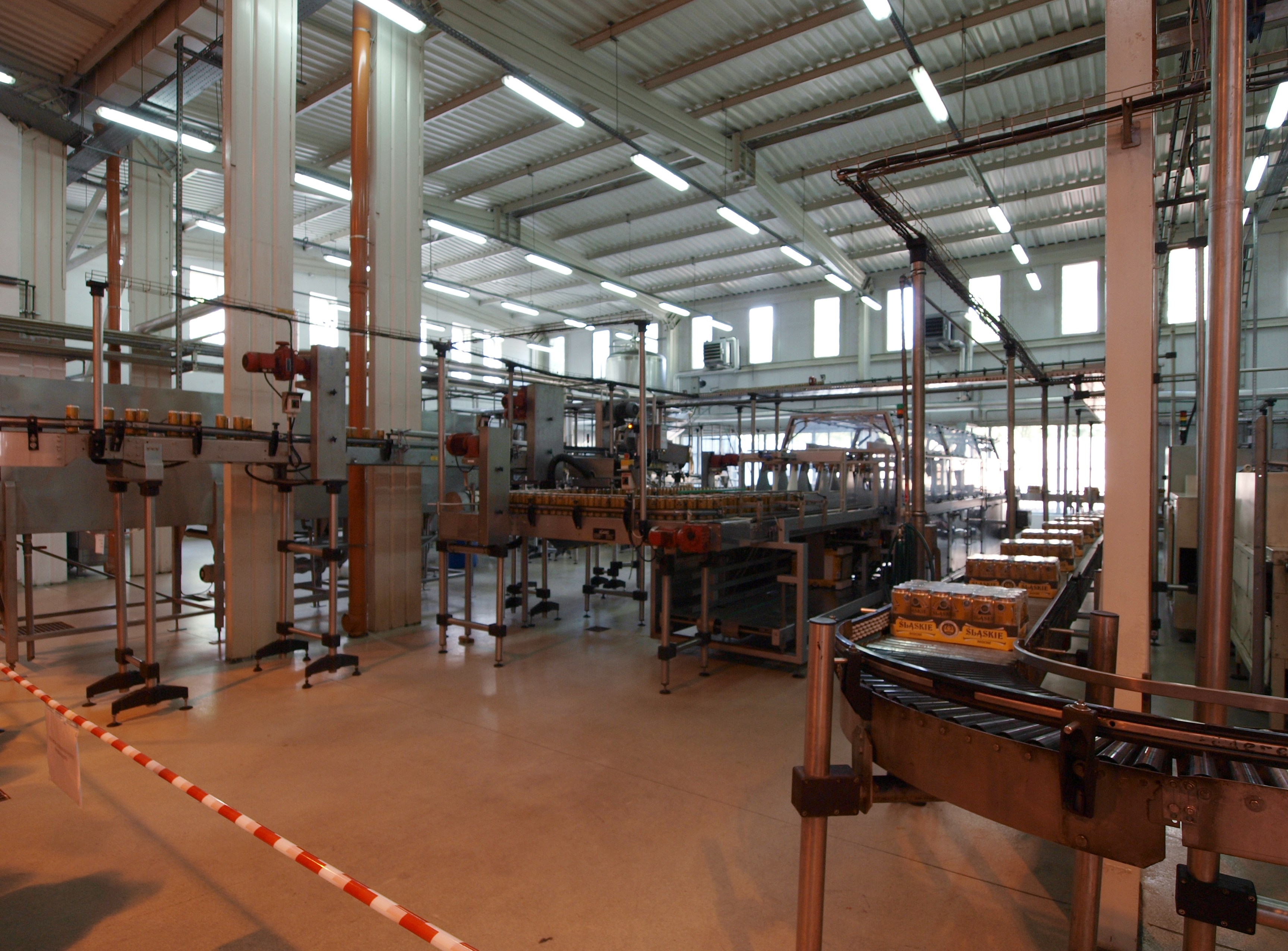 Browary Górnośląskie w Zabrzu. Rozlewnia piwa puszkowego.